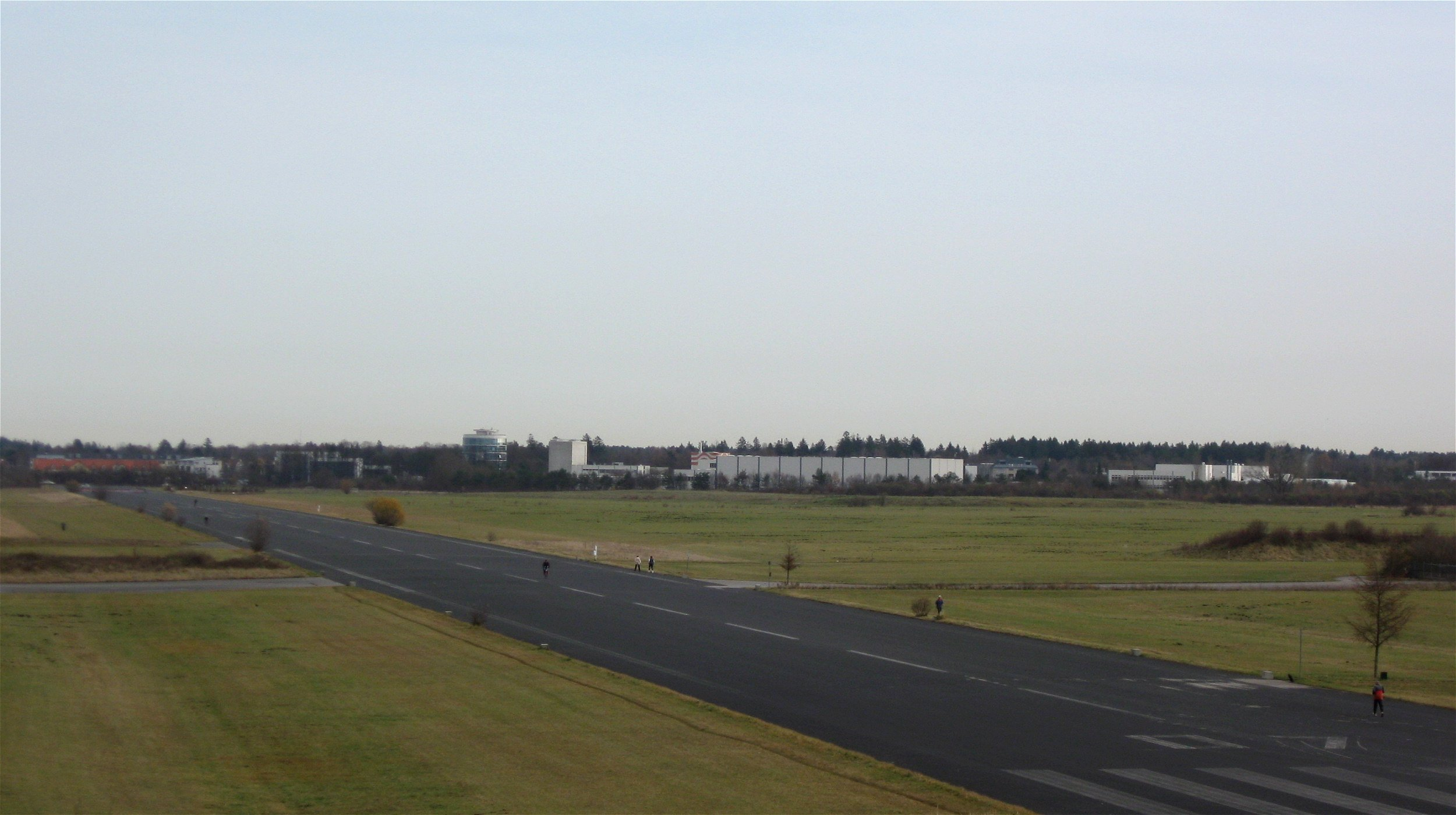 Landschaftspark Hachinger Tal, Blick auf die ehemalige Landebahn